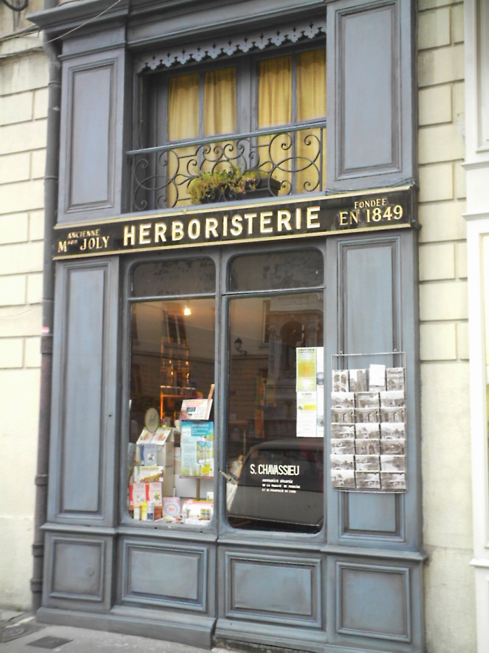 vitrine d'une herboristerie, vieux Lyon (5°)